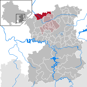 Langenorla in Thuringia - Saale-Orla-Kreis